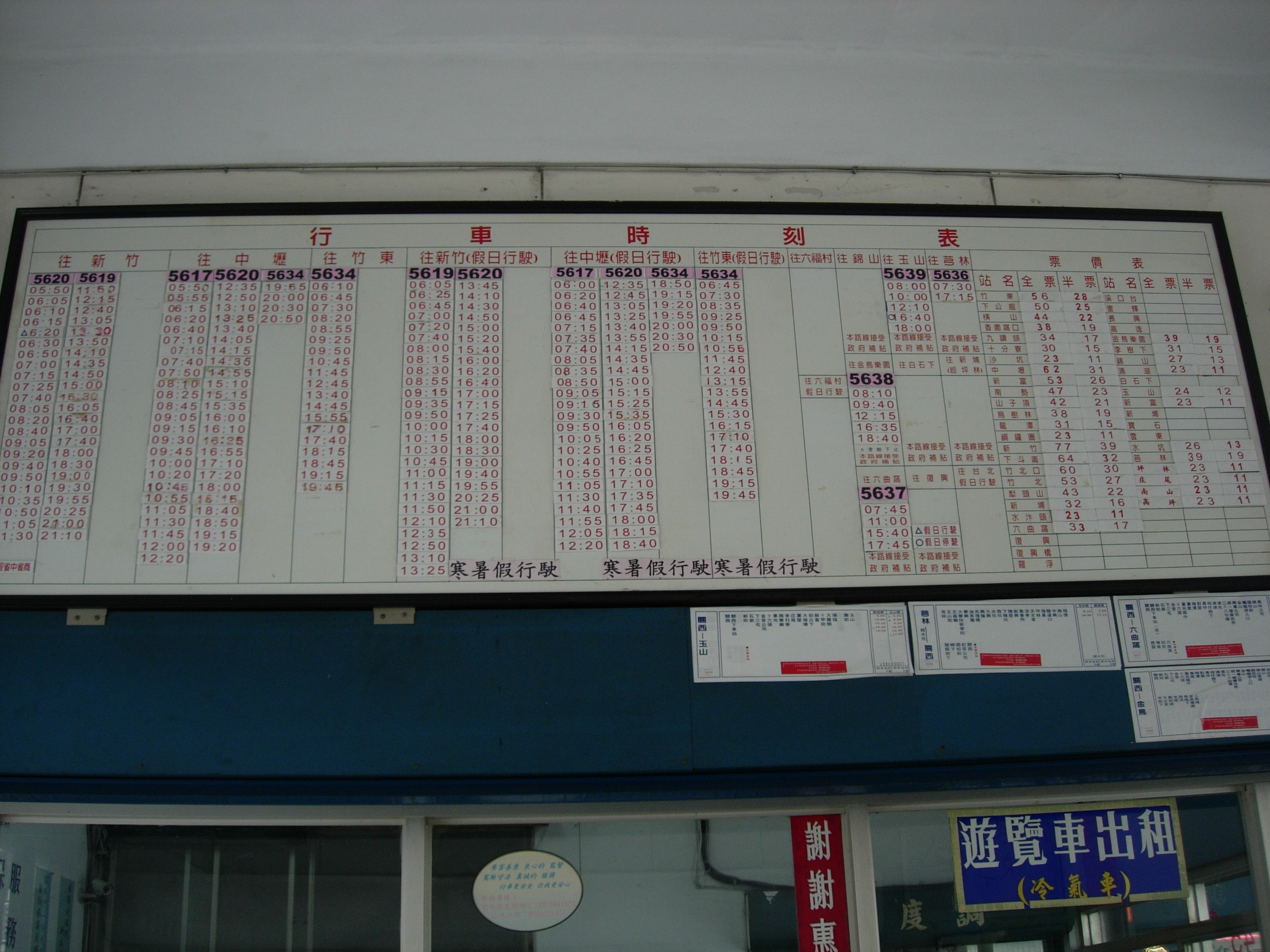 中文（台灣）: 新竹客運關西站時刻表